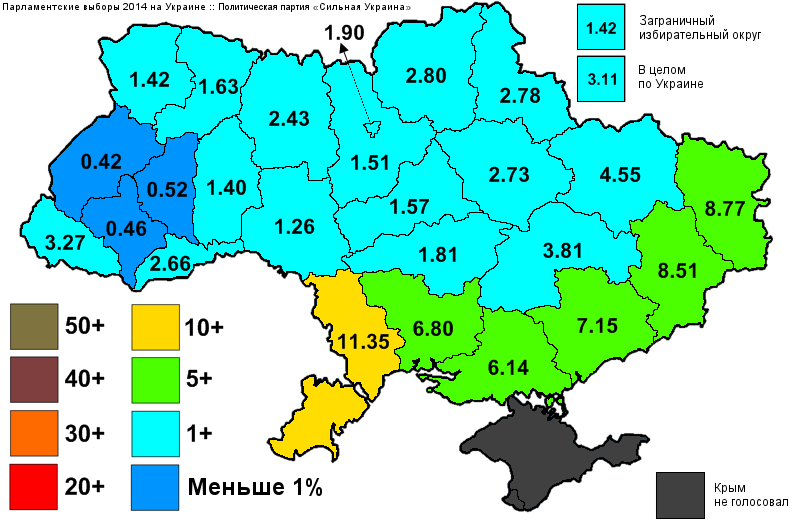 Результаты выборов в Верховную Раду Украины, которые состоялись 25 октября 2014 года. Информация с официального сайта ЦИК. Проценты по регионам для партии "Сильная Украина".